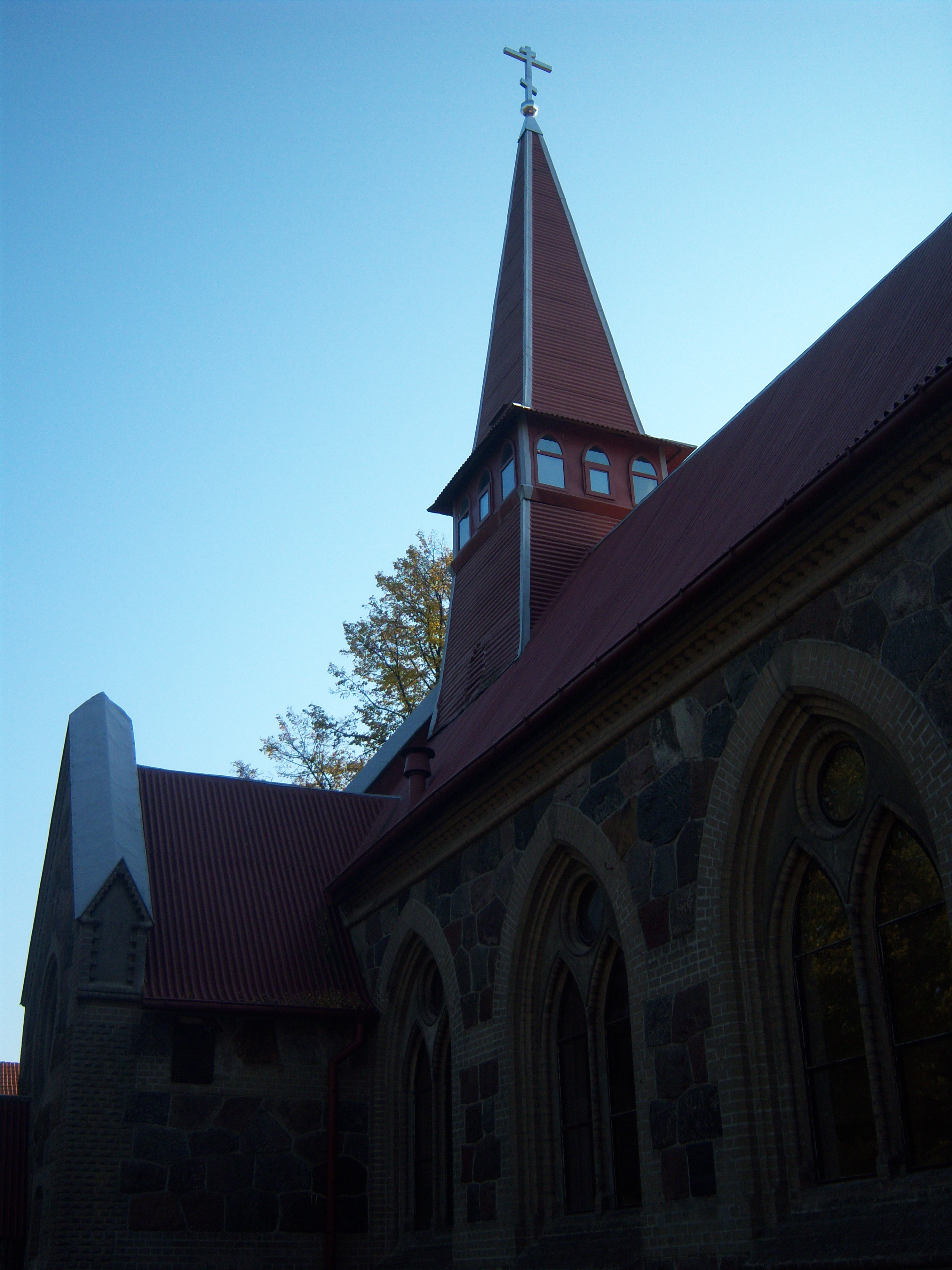 На снимке изображена кирха в пос. Янтарный. В кирхе находится сейчас православный храм.